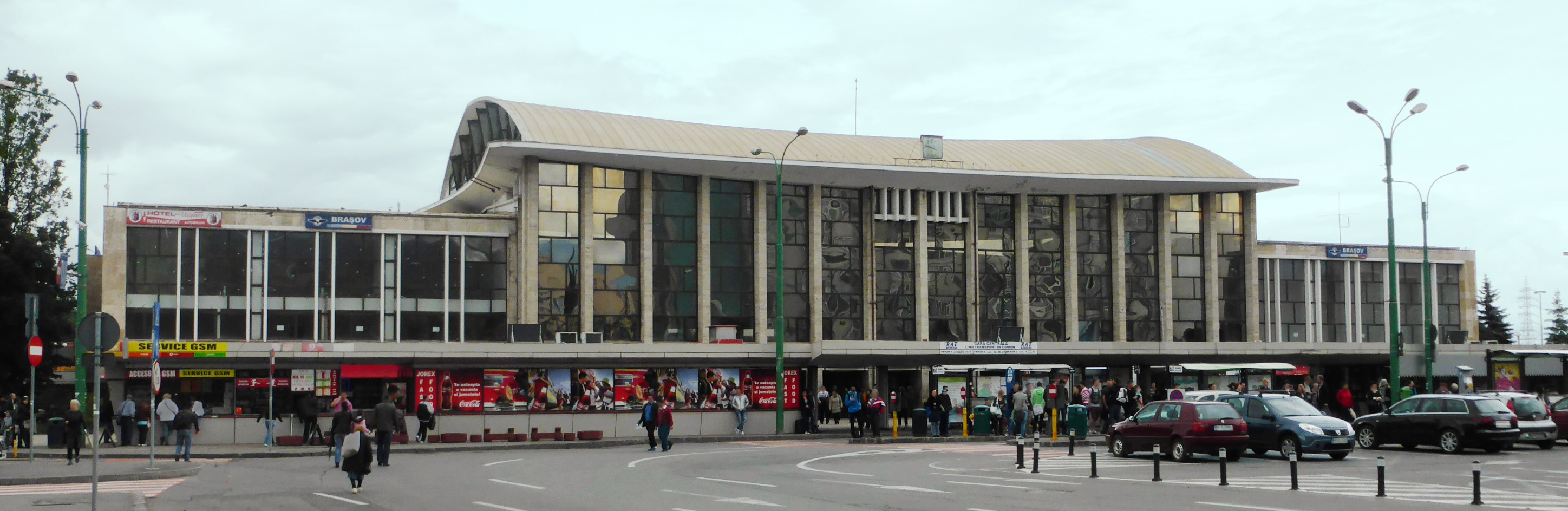 Der Bahnhof von Kronstadt (Brașov).